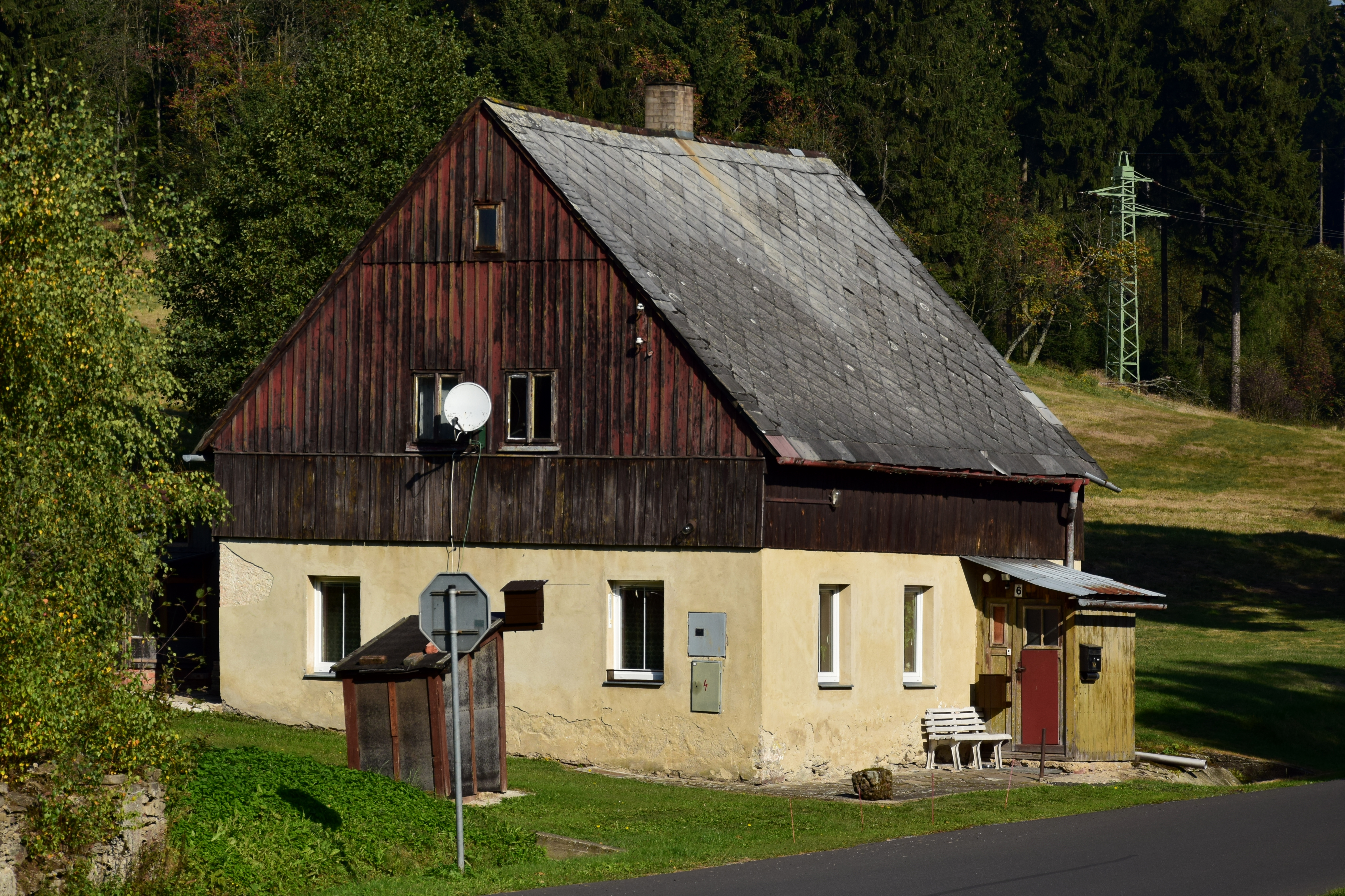 Černý Potok – dům čp. 6